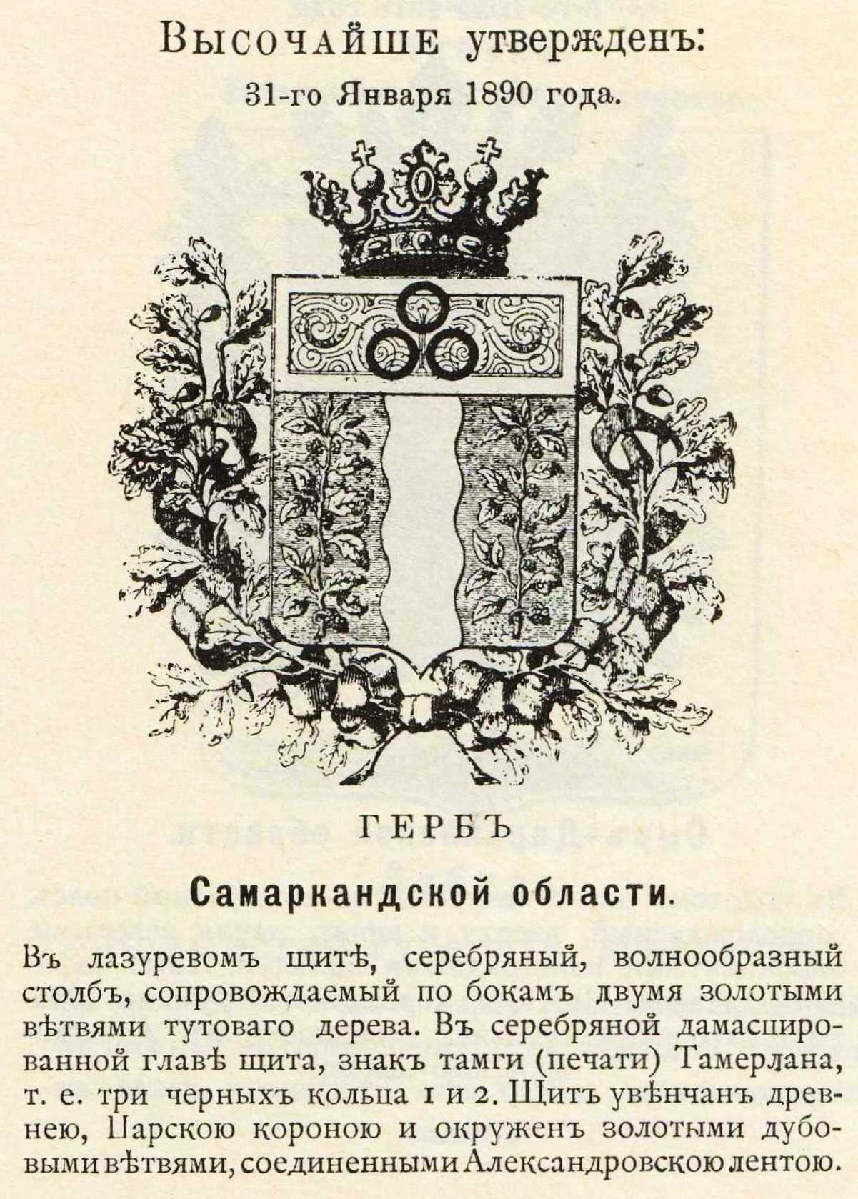 Official Russian Empire coat of arms Samarkand Oblast. Герб Российской Империи Самаркандской области с официальным описанием в Гербовнике Винклера.